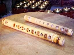 Bangsi Alas alat musik tiup dari Aceh Tenggara